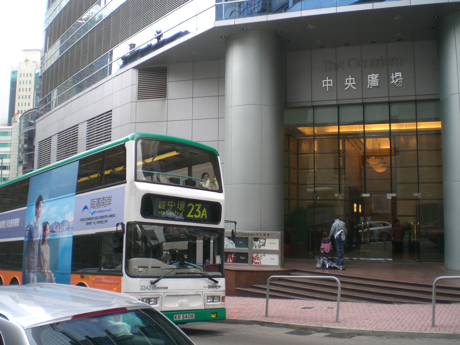 香港中環中央廣場，雲咸街60號，寫字樓入口亞畢諾道2A